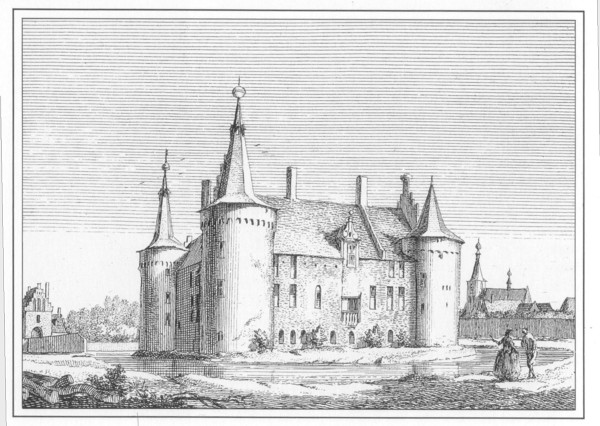 17e eeuwse prent (geen auteursrechten)